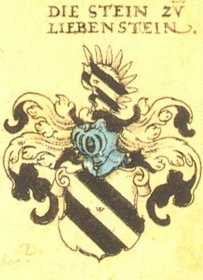 Ritterschaft und Adel in Thüringen; Stein zu Liebenstein